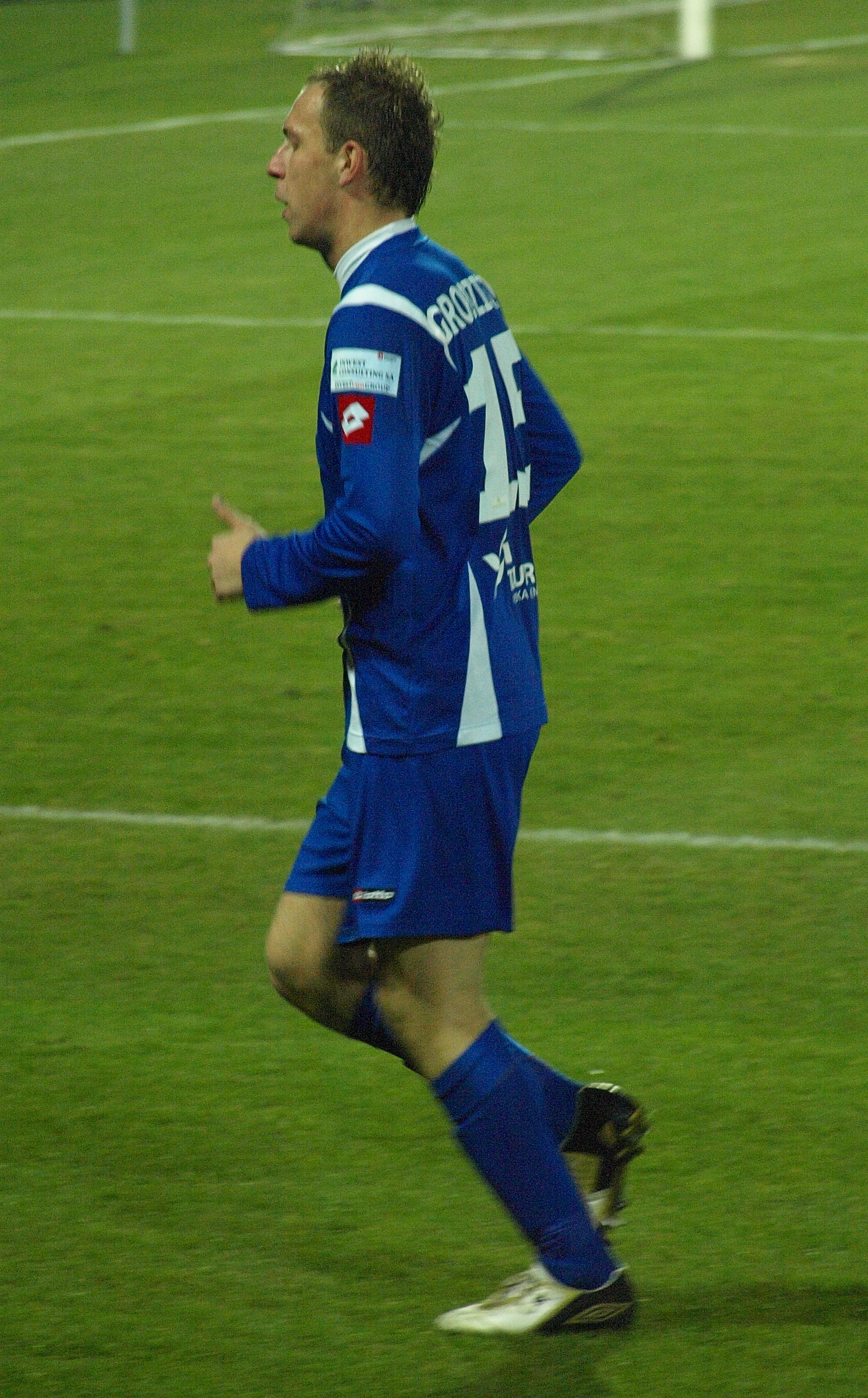 Rafał Grodzicki, piłkarz Ruchu Chorzów